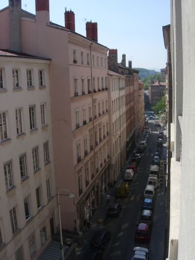 Rue Burdeau - Lyon - Vue ouest